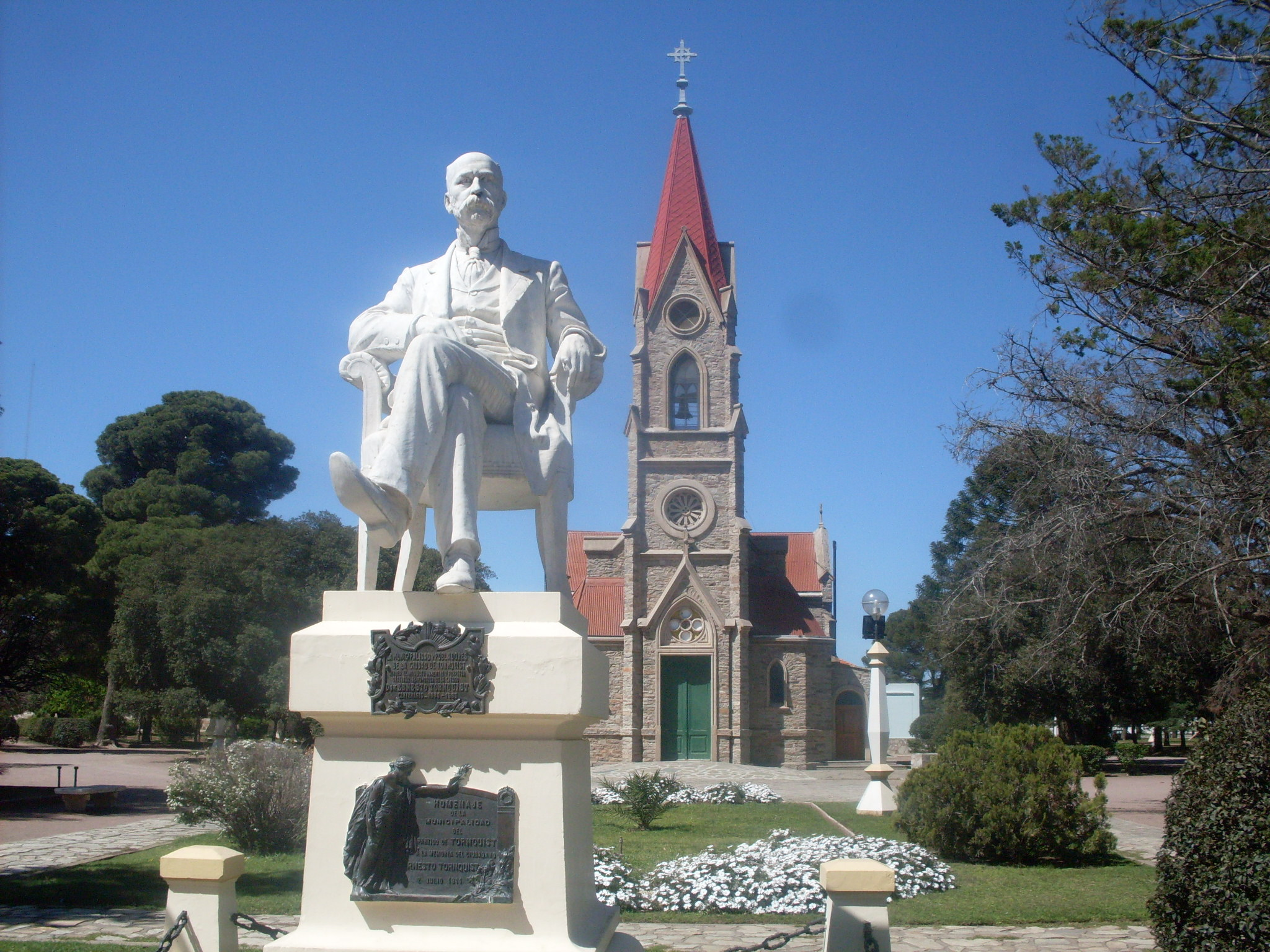 Plaza Tornquist, Buenos Aires.